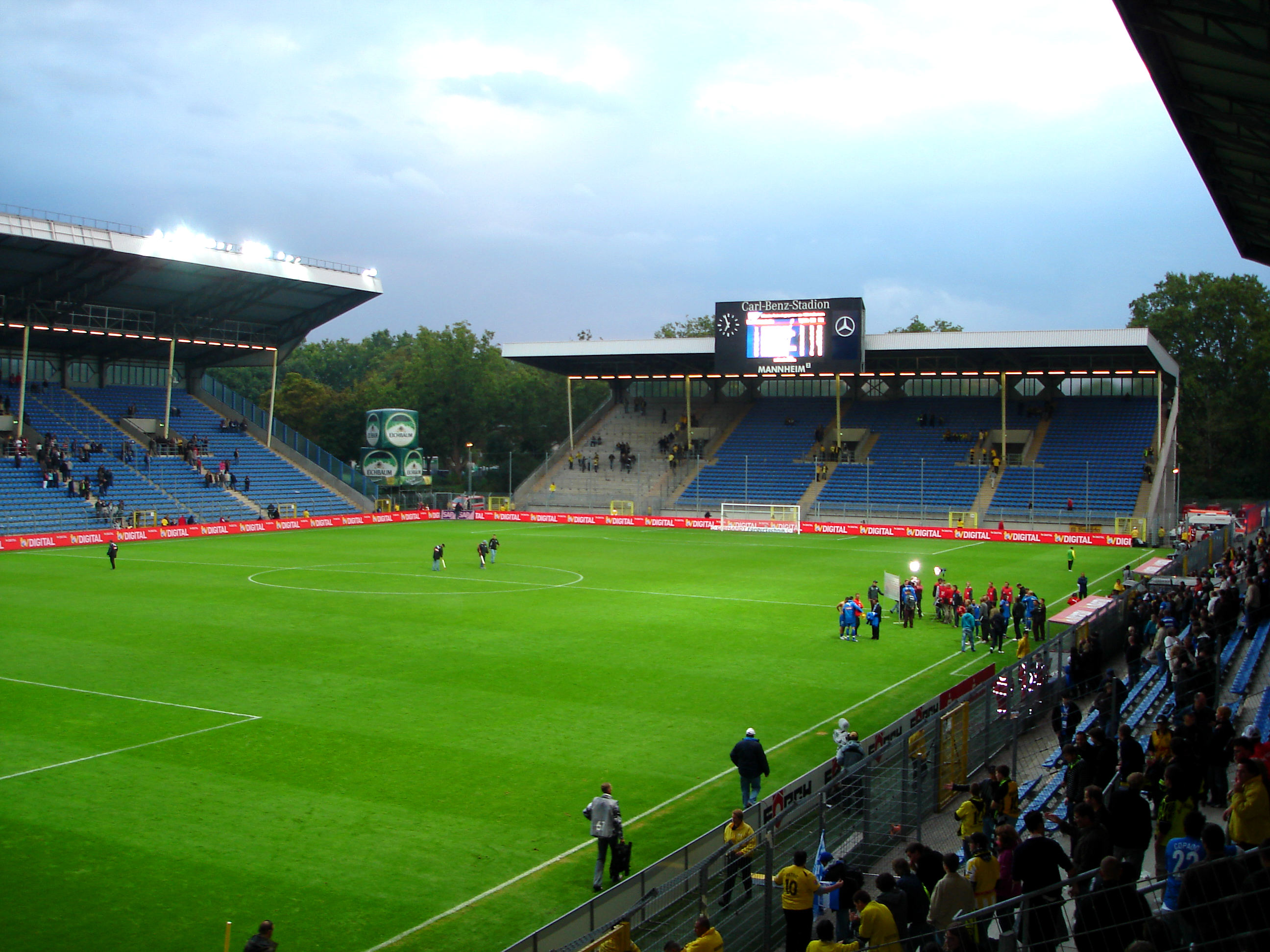 Deutschland: Carl-Benz-Stadion in Mannheim nach dem Bundesligaspiel TSG Hoffenheim – Borussia Dortmund (4:1)